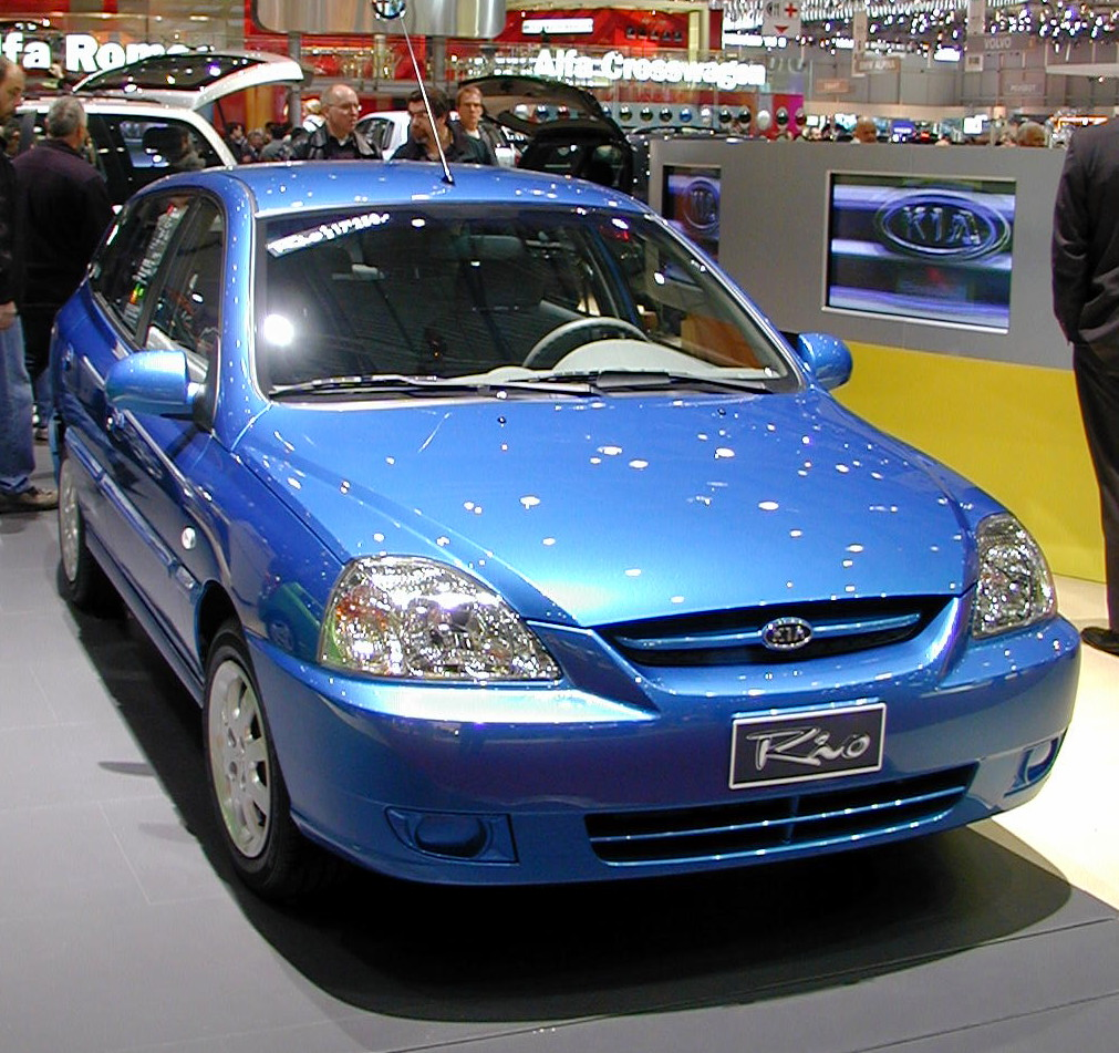 Salon de Genève 2004 SAG2004 005 Kia Rio